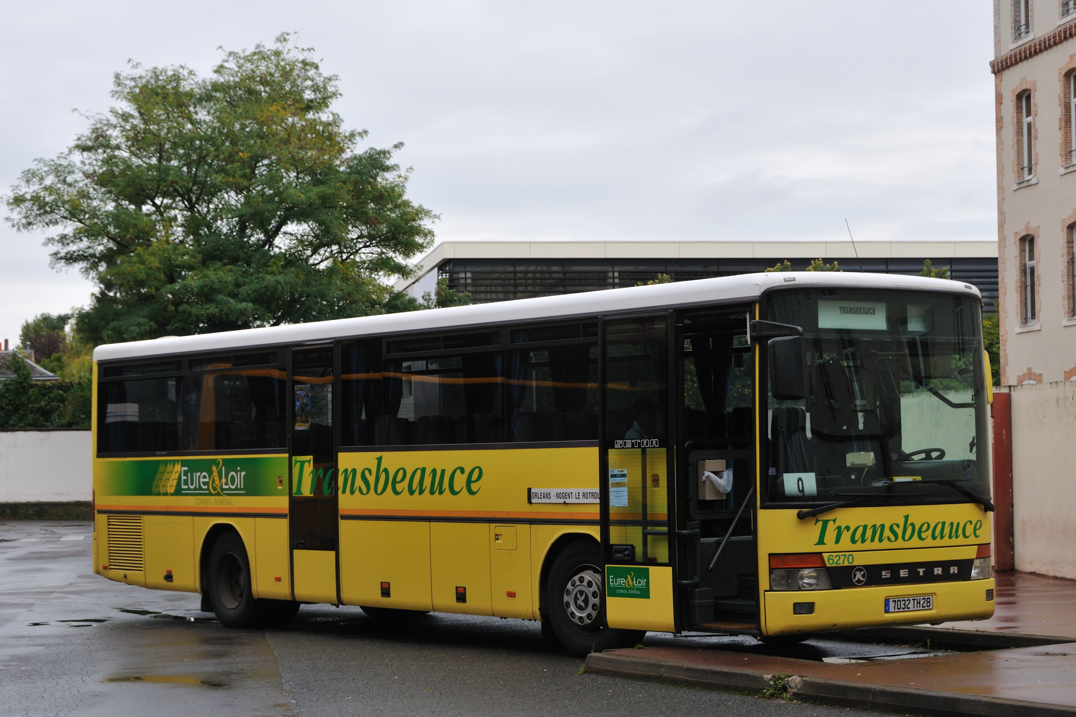 Gare routière d'Orléans, Loiret, France Un autocar du réseau Transbeauce de transports en commun d'Eure-et-Loir